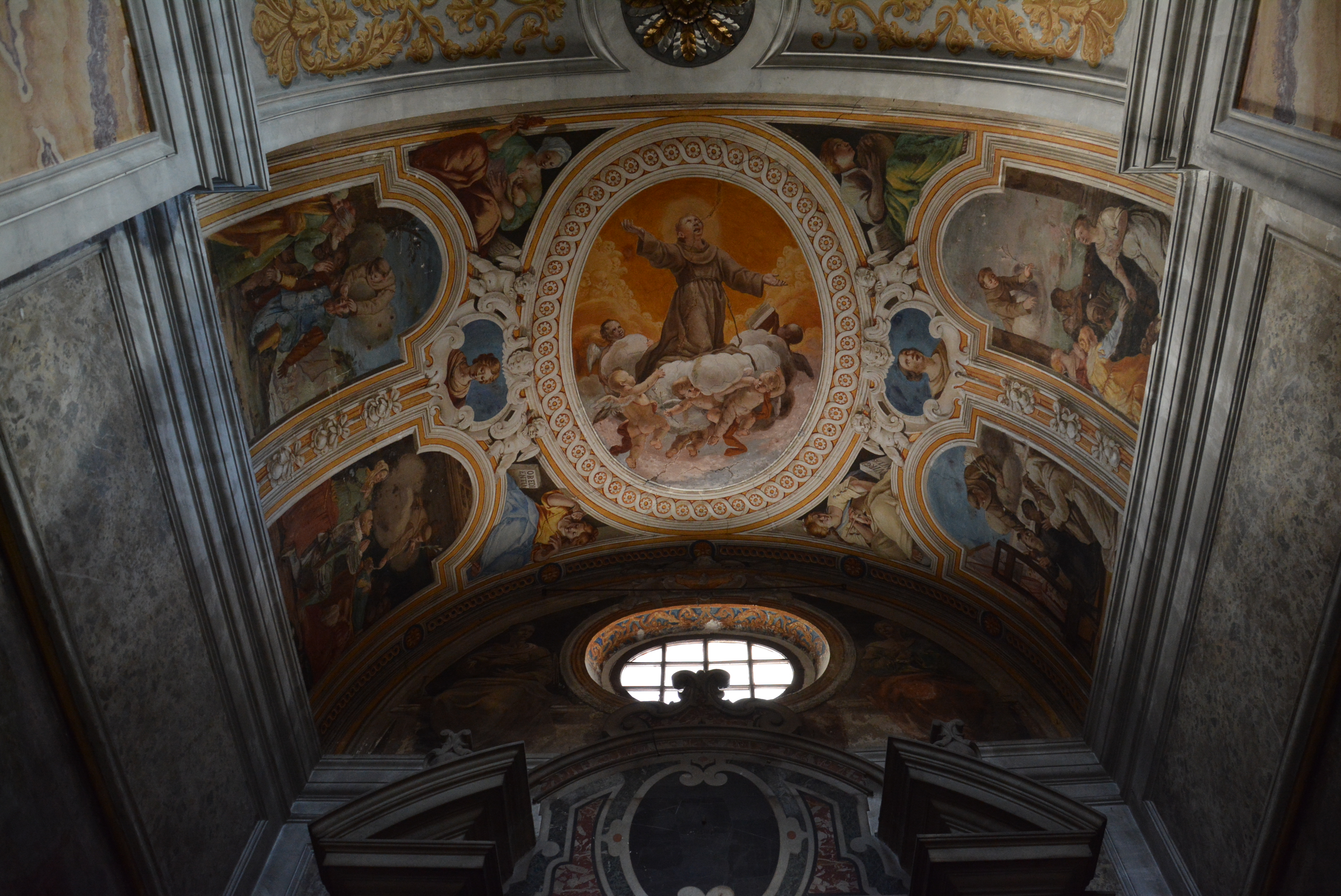 Cappella Gruther nella chiesa di Santa Maria la Nova a Napoli